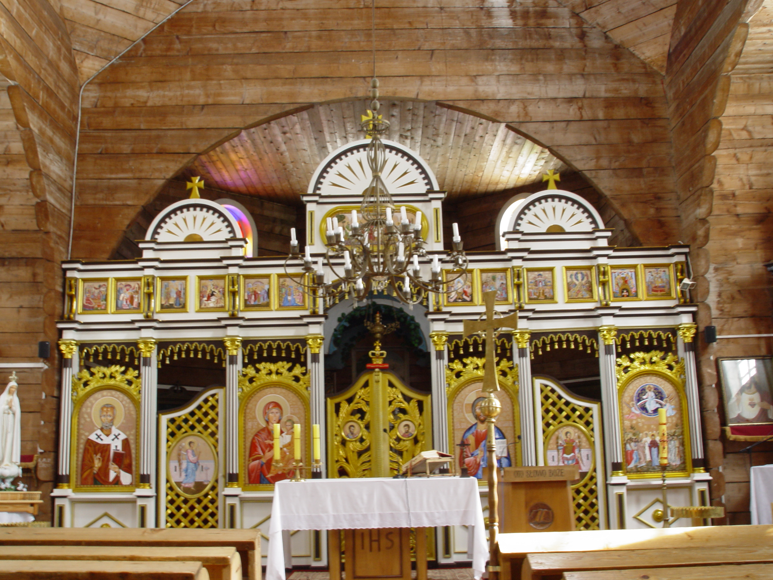 zespół cerkwi greko-kat., ob. kościół par. rzym.-kat. p.w. św. Jana Chrzciciela, drewn., 1938 fot. ikonostas